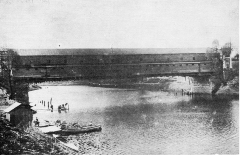 Деревянный мост через Пахру, вид с Красной Горки